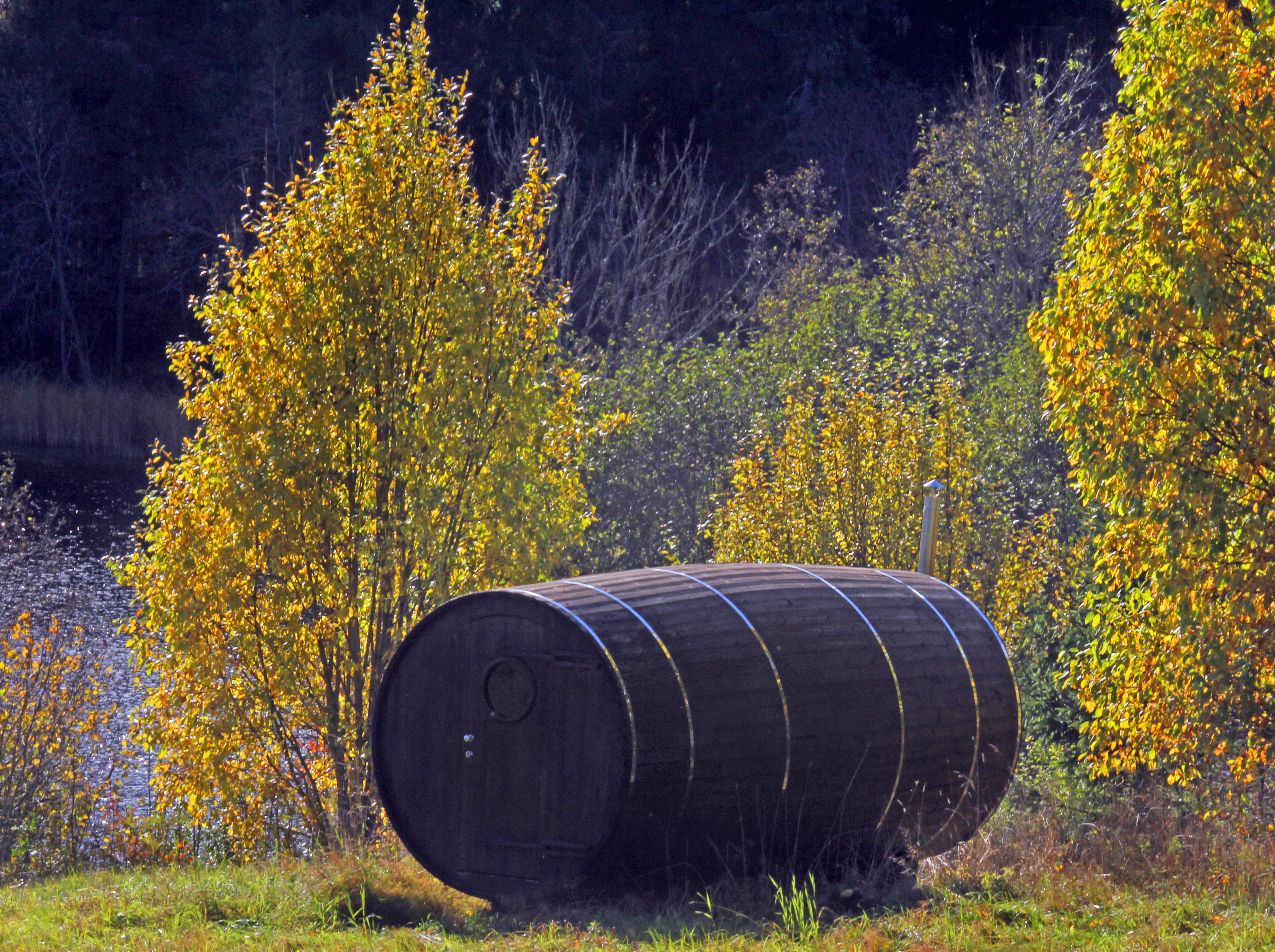 Tünnisaun veekogu kaldal